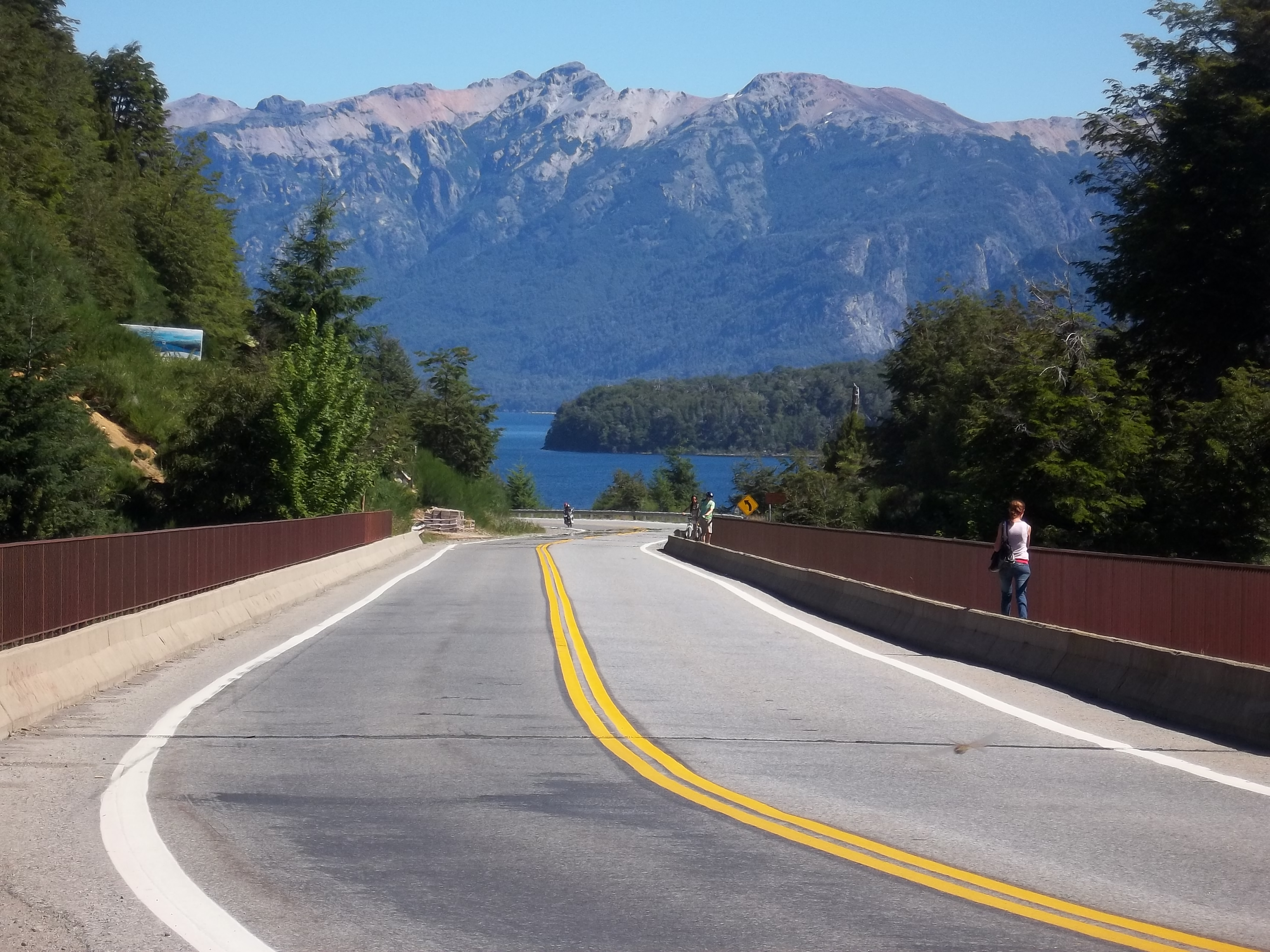 Calzada del puente de la RN 231 sobre el Río Correntoso cerca de Villa La Angostura, provincia del Neuquén, Argentina. Al fondo, lago Nahuel Huapi.